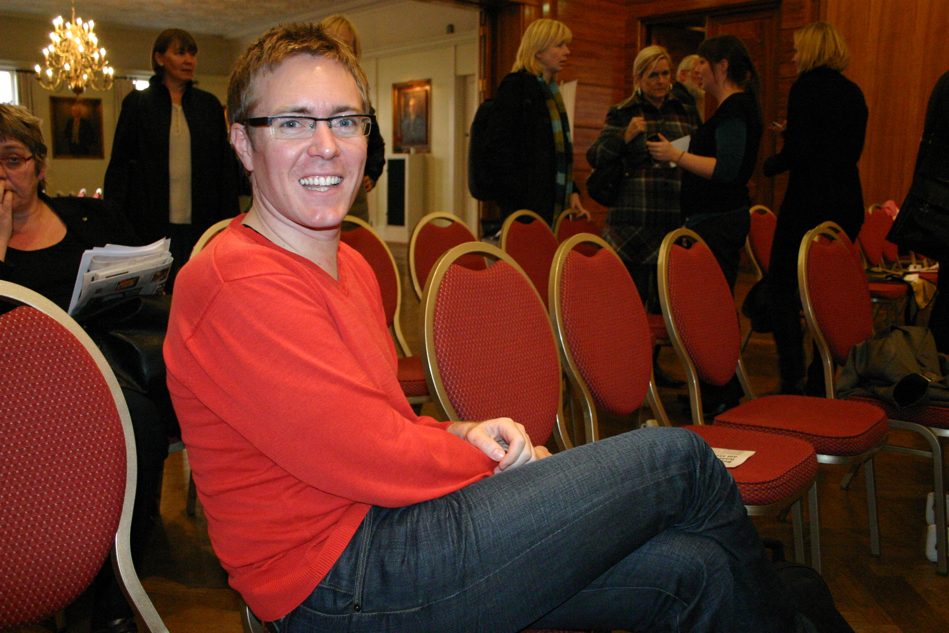 Torbjørn Urfjell, SV-politiker.